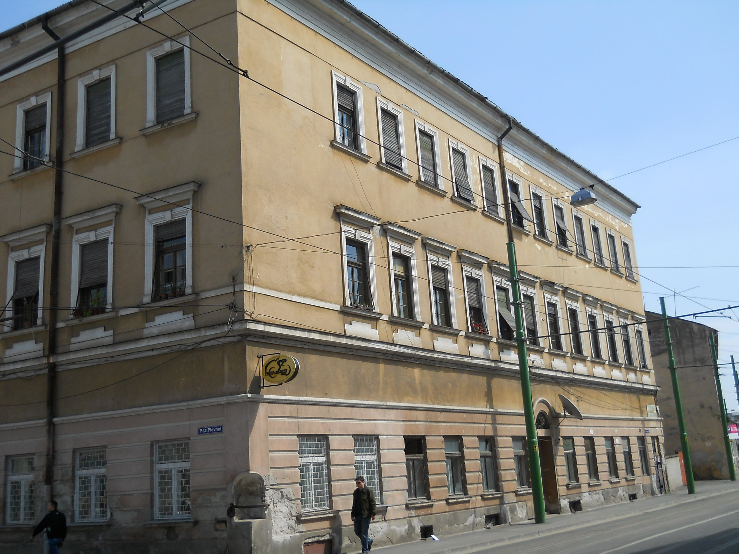 Casa cu lacat, edificiu situat pe strada Plevnei